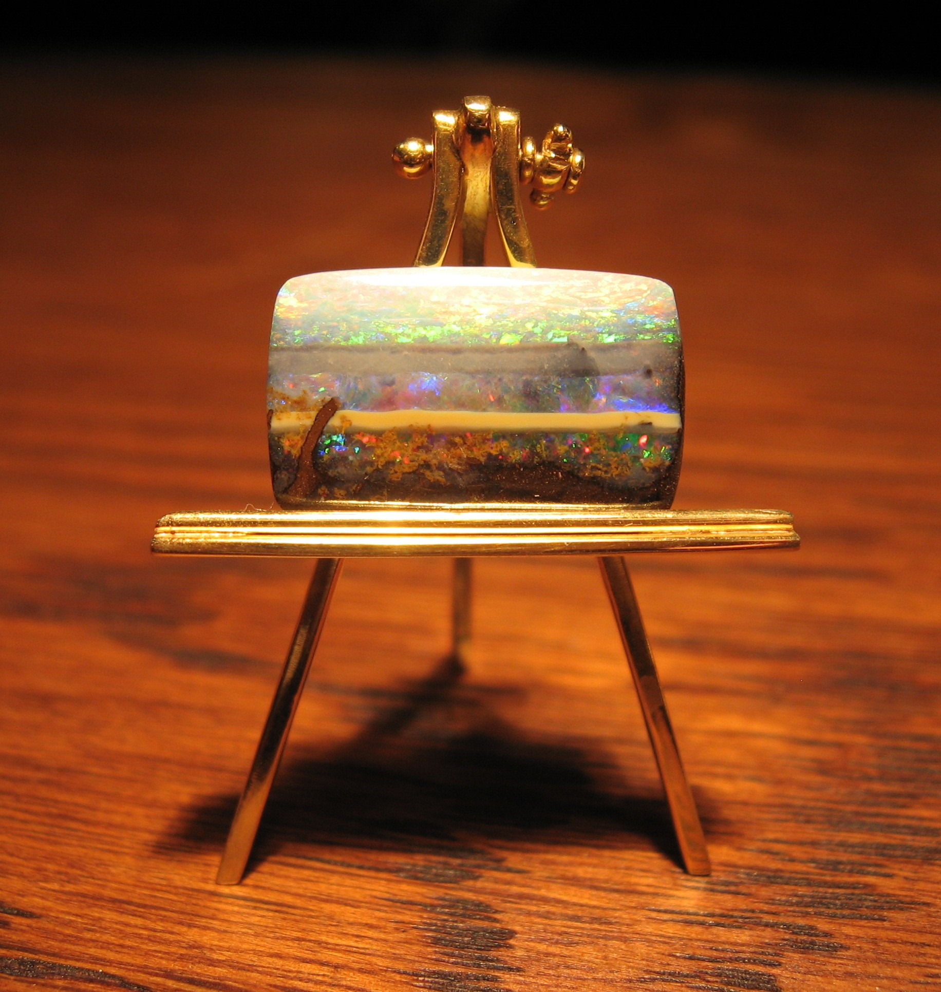 Opal-Matrix mit Bänderung, die an Strand, Wasser und Himmel erinnert, auf gold. Malerstaffelei